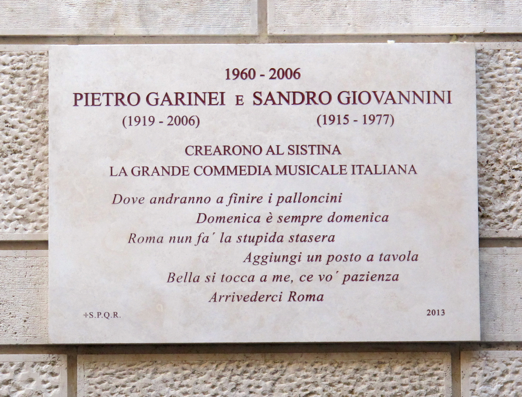 Roma, vedi titolo